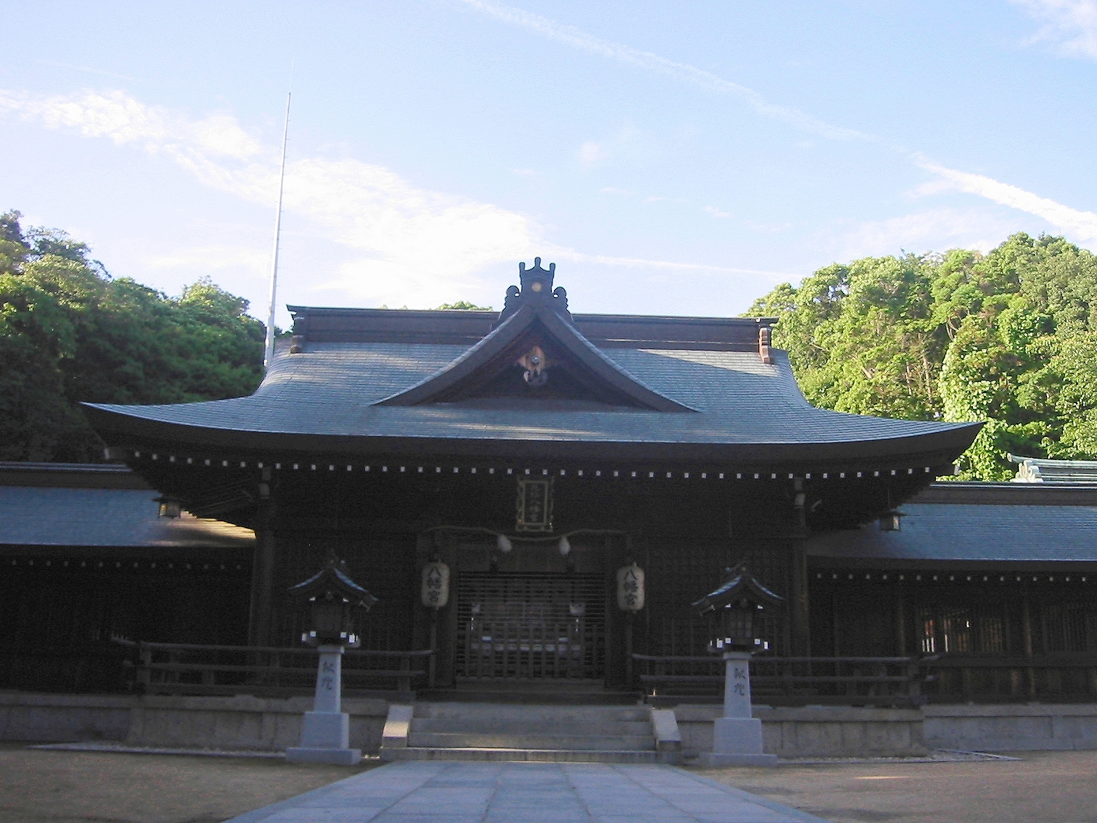 多井畑厄除八幡宮